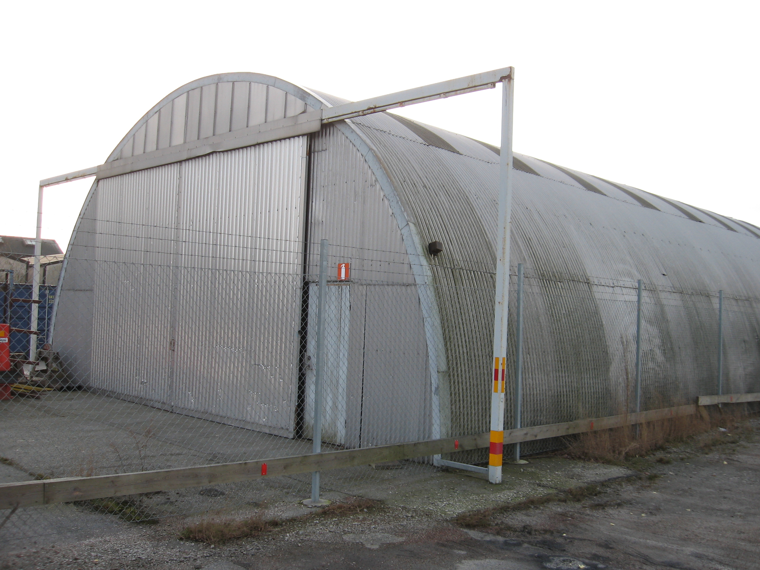 Båghall i Lund